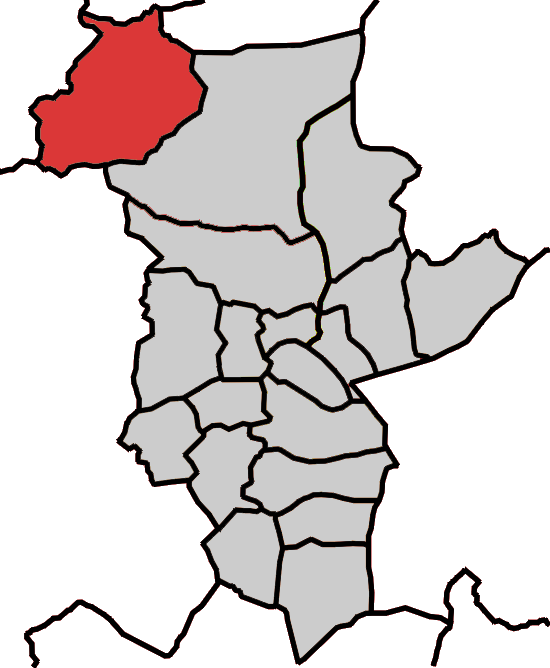 Situación da parroquia de Montouto no concello de Abadín